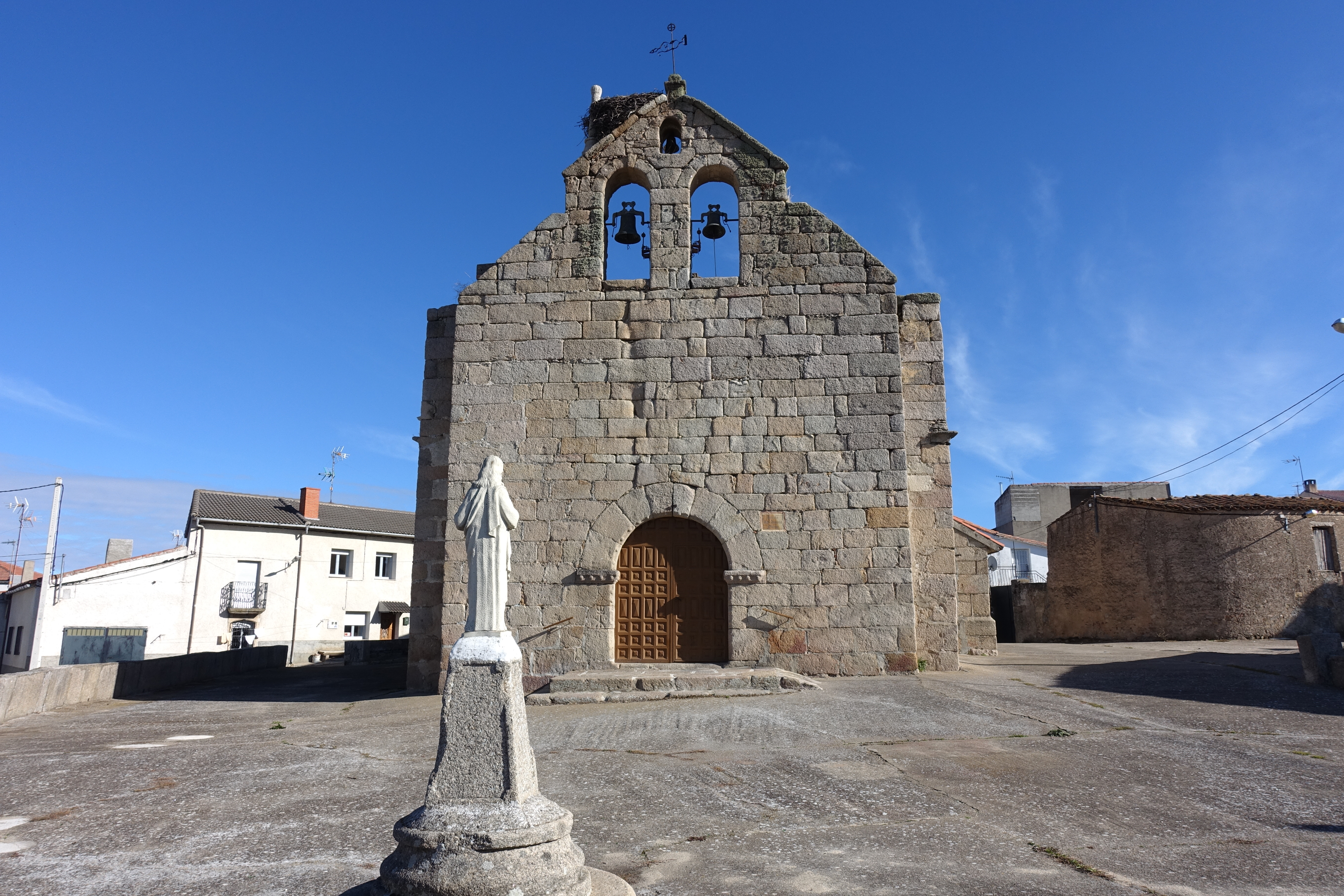 Iglesia de San Atanasio, Puebla de Azaba (Salamanca, España).